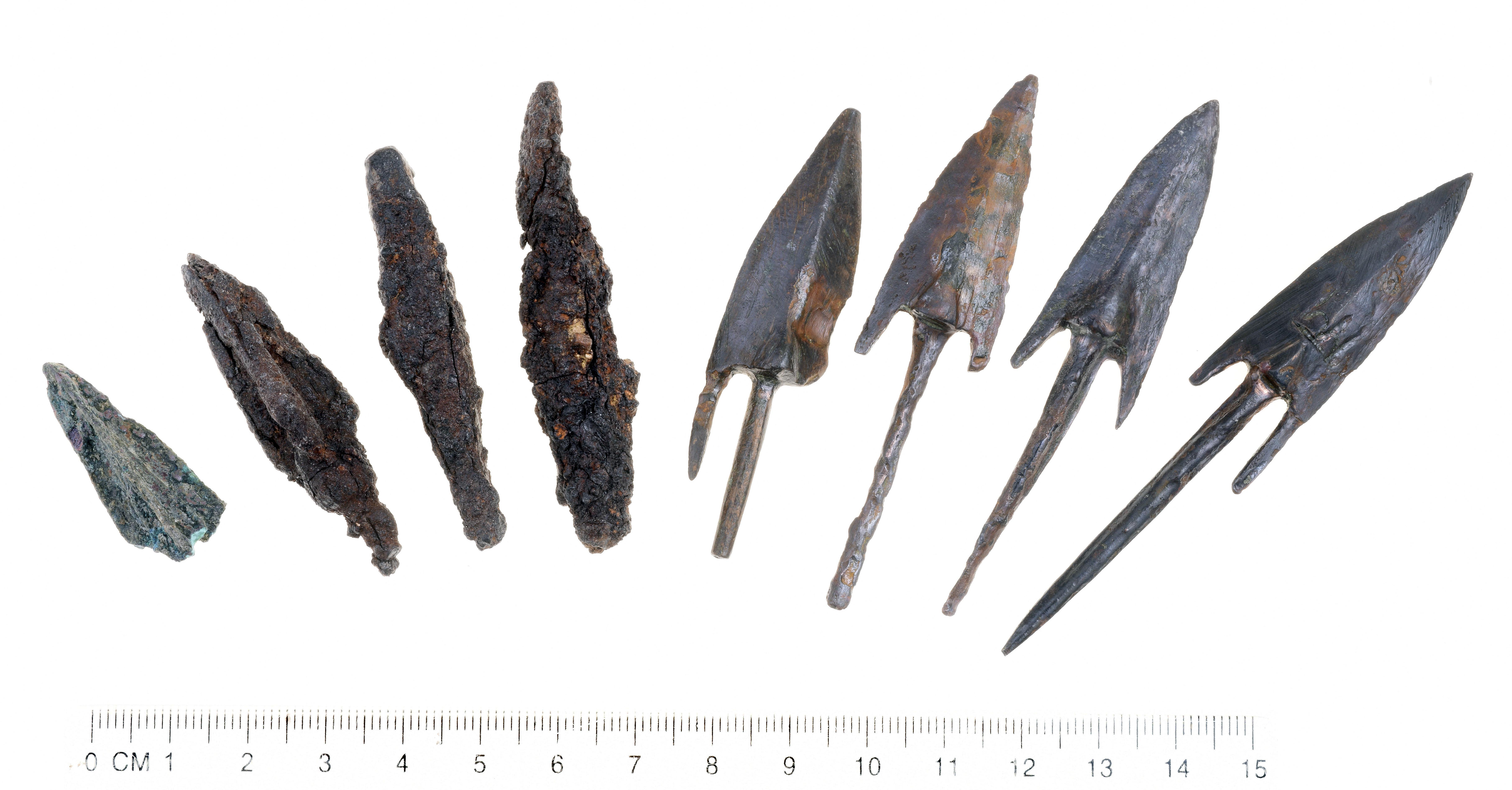 אבני קלע מעופרת וראשי חצים שעליהם הוטבע קילשון – סמל שלטונו של אנטיוכוס אפיפנס - עדות לנסיונות לכבוש את המבצר